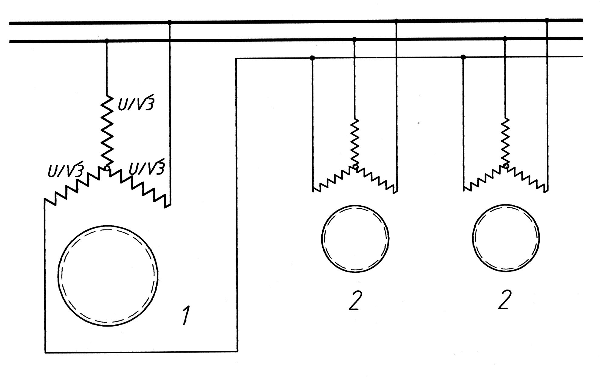 Ferraris-Arno asszinkron fázisváltója. 1. átalakító. 2. három fázisú motor